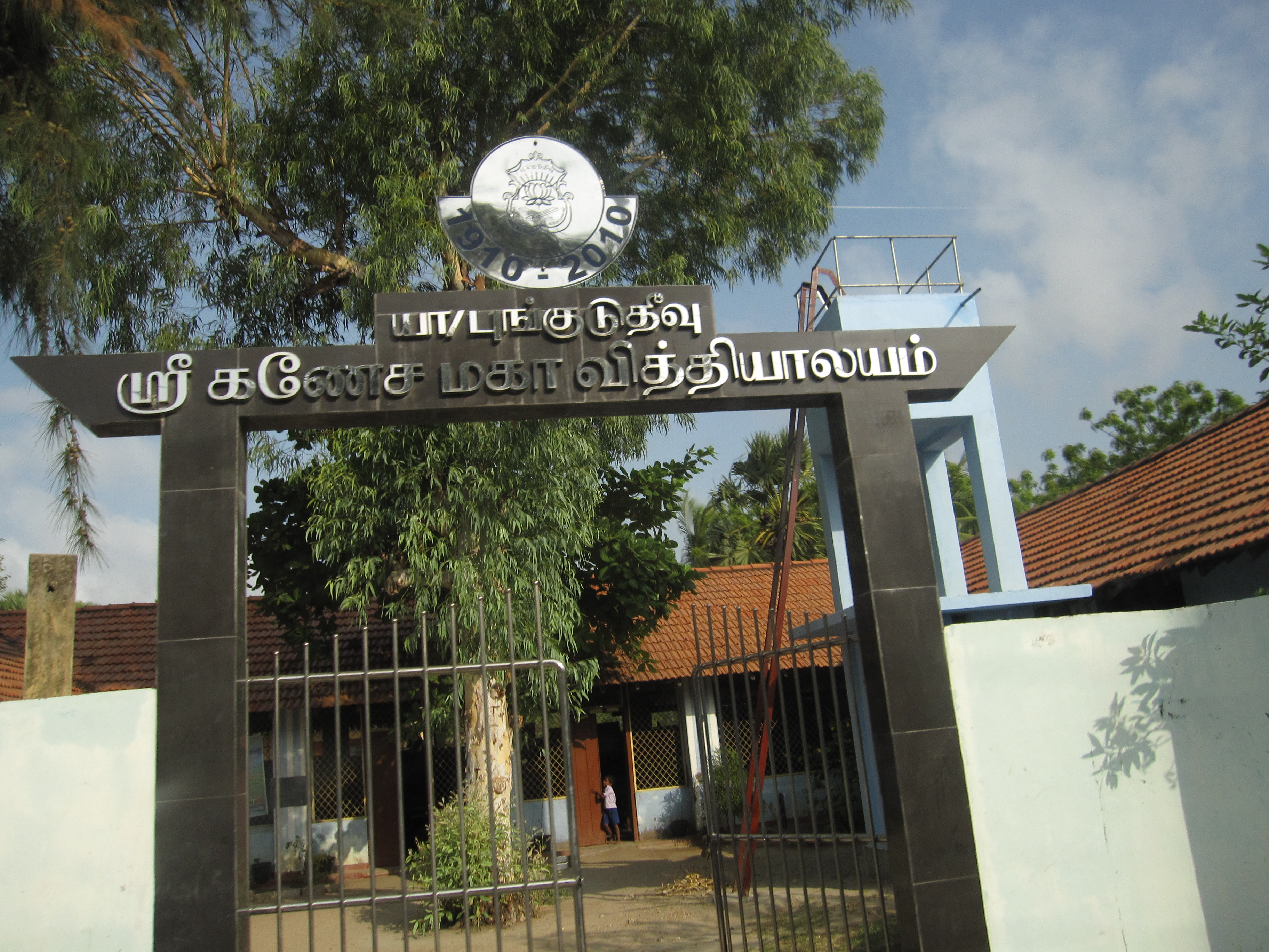 புங்குடுதீவு சிறீ கணேச மகா வித்தியாலயம்